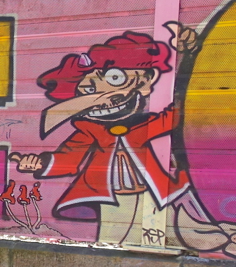 Le personnage « Iznogoud » sur un mur anti-bruit proche de la gare Cornavin à Genève, parc Galiffe.